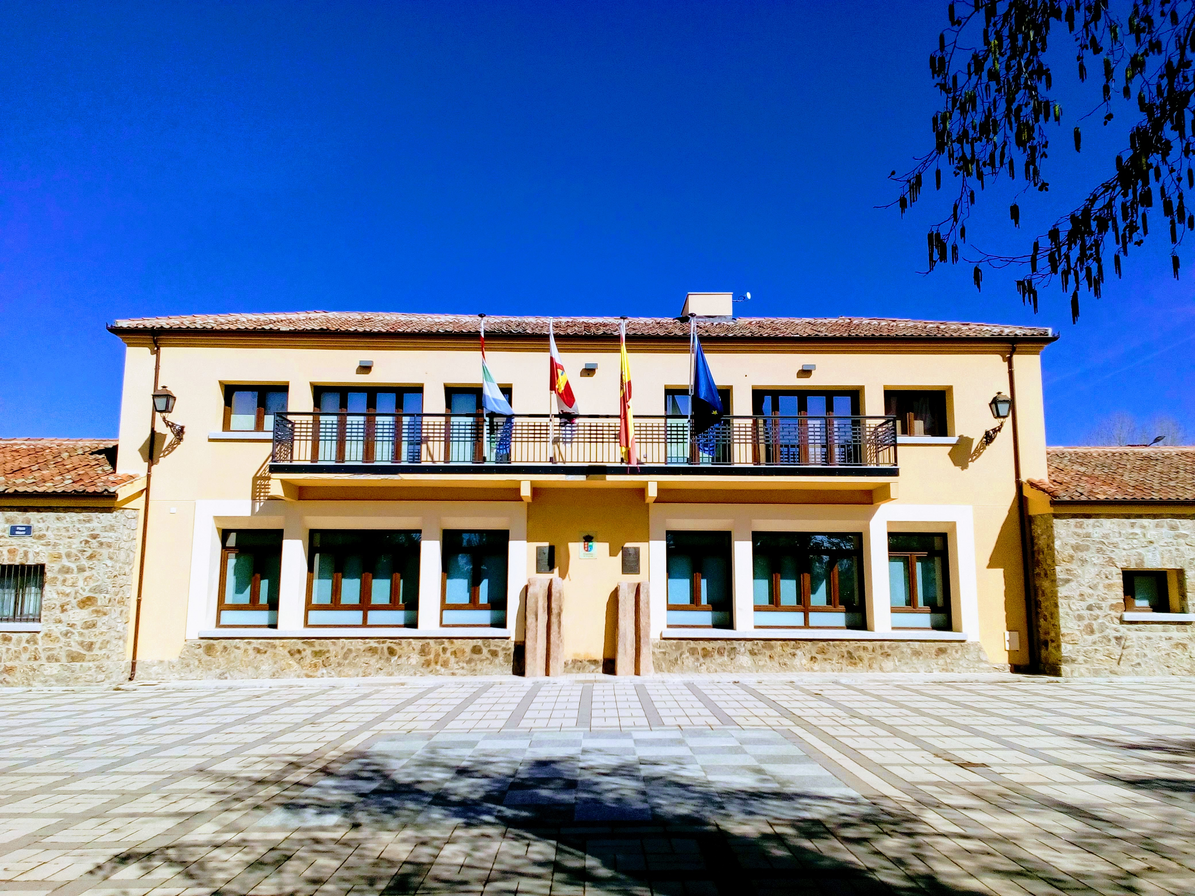 Casa consistorial de Trescasas desde la plaza mayor de Trescasas.